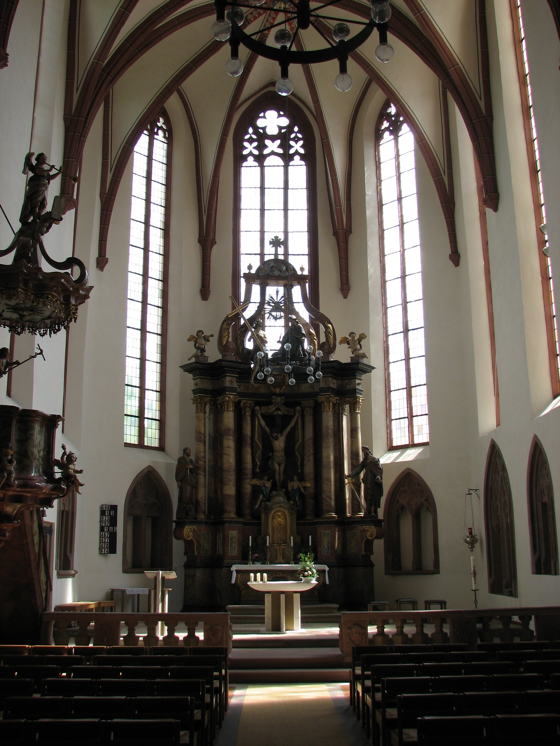 Innenraum der Kirche St. Juliana in Mosbach